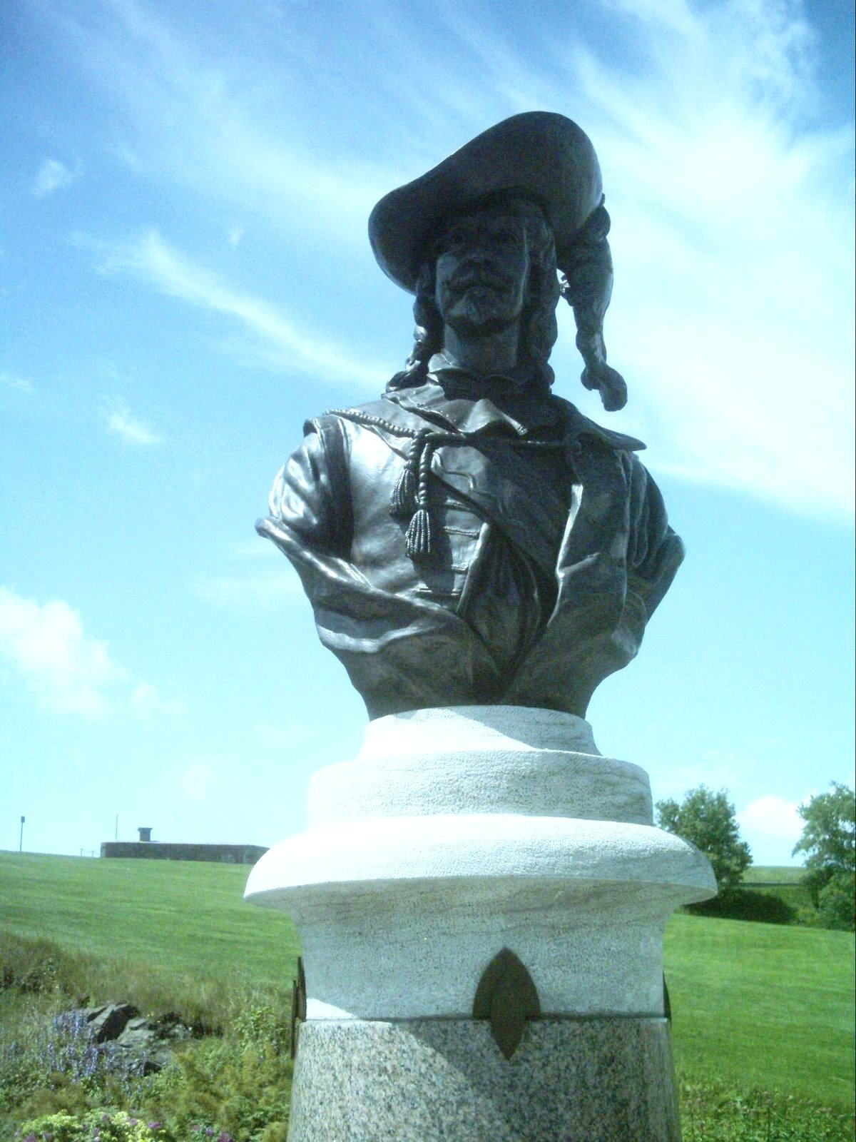 Pierre Dugua de Mons, monument à Québec